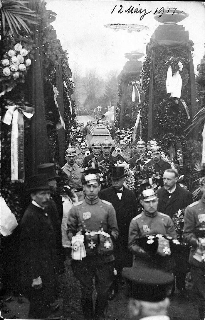 Beerdigung Graf Zeppelin am 12.März 1917 auf dem Pragfriedhof in Stuttgart